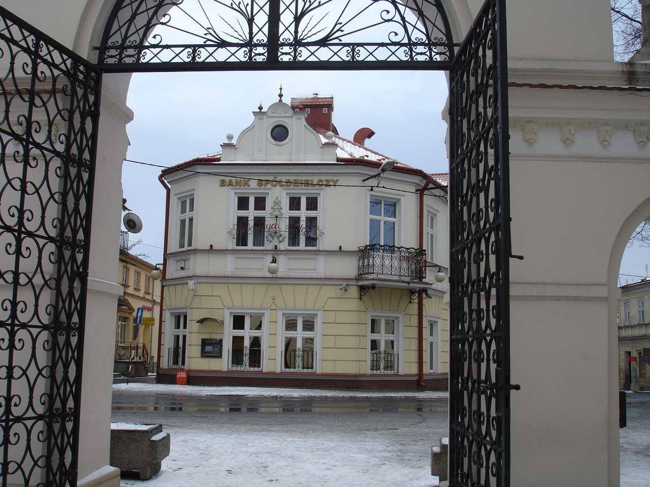 Dynów grudz 31